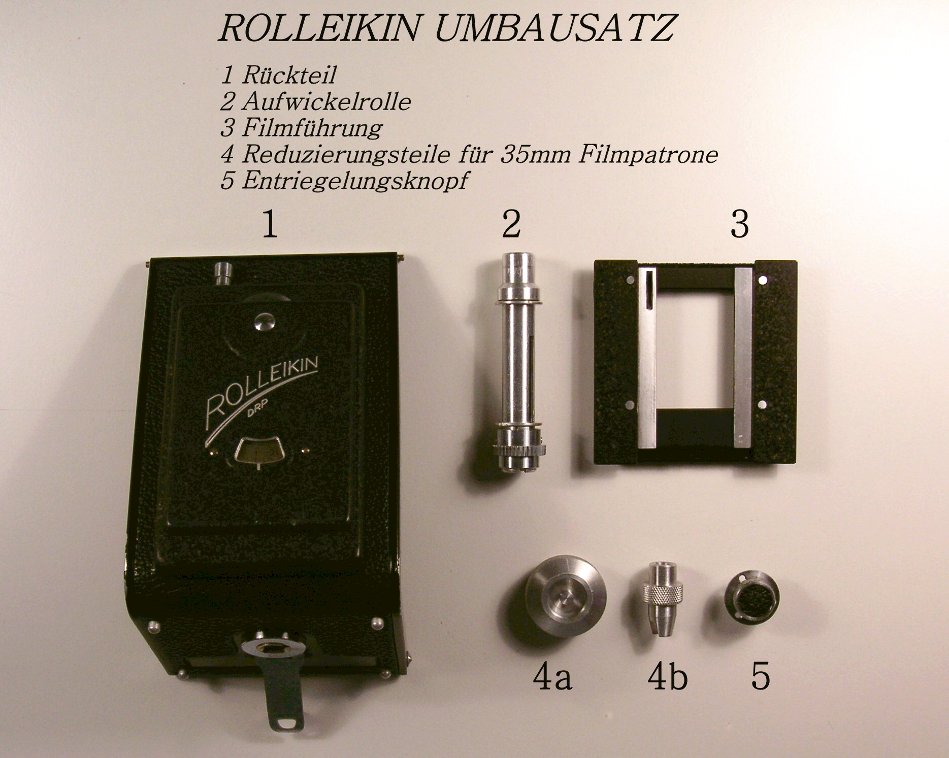 Rolleikin-Bausatz zum Umbau einer Rolleiflex 6x6 für 35mm Film